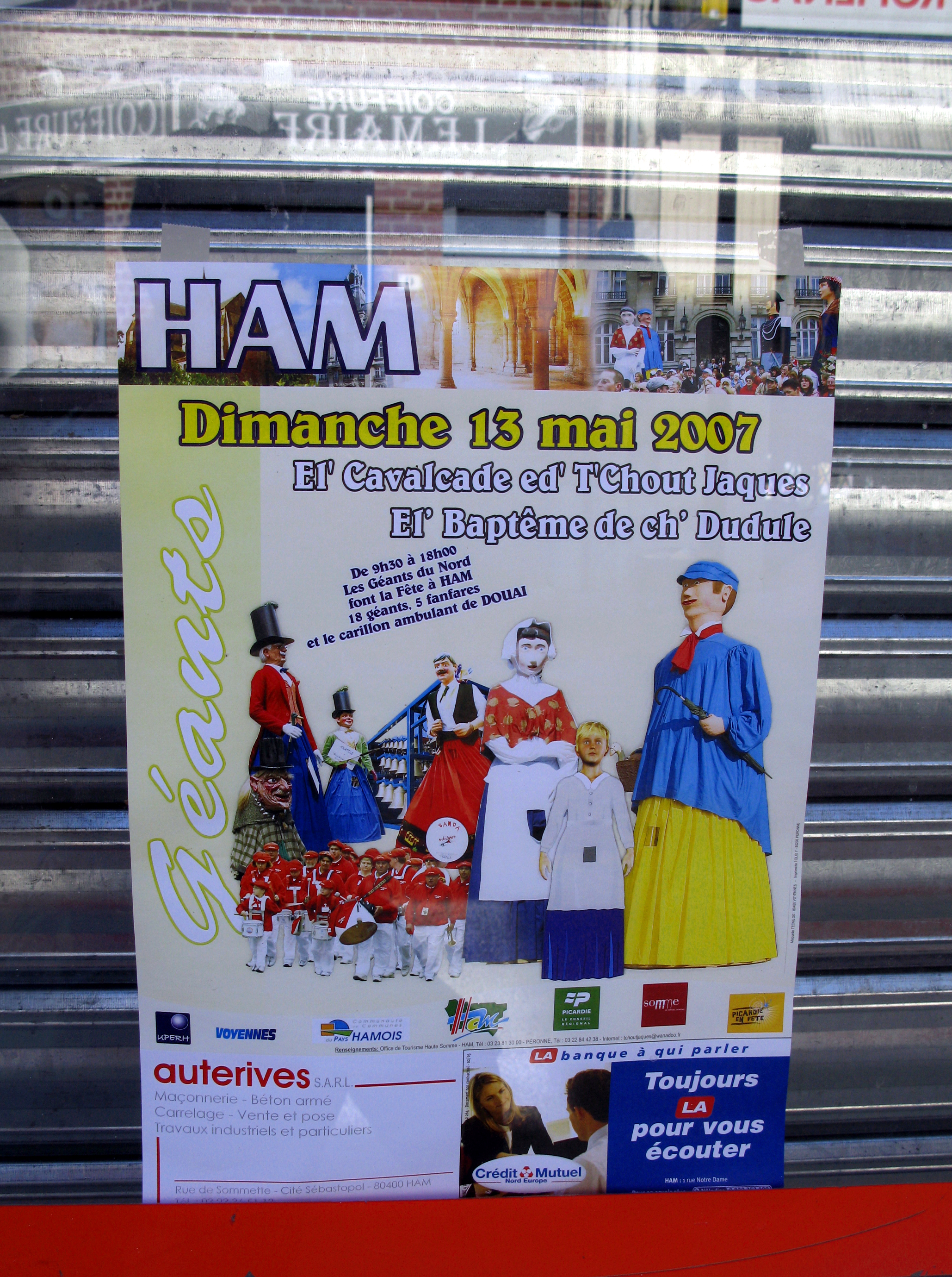 Ham (Somme, France) - Animation festive au centre-ville, un dimanche de printemps. Affiche de la parade vue à la vitrine d'un magasin.